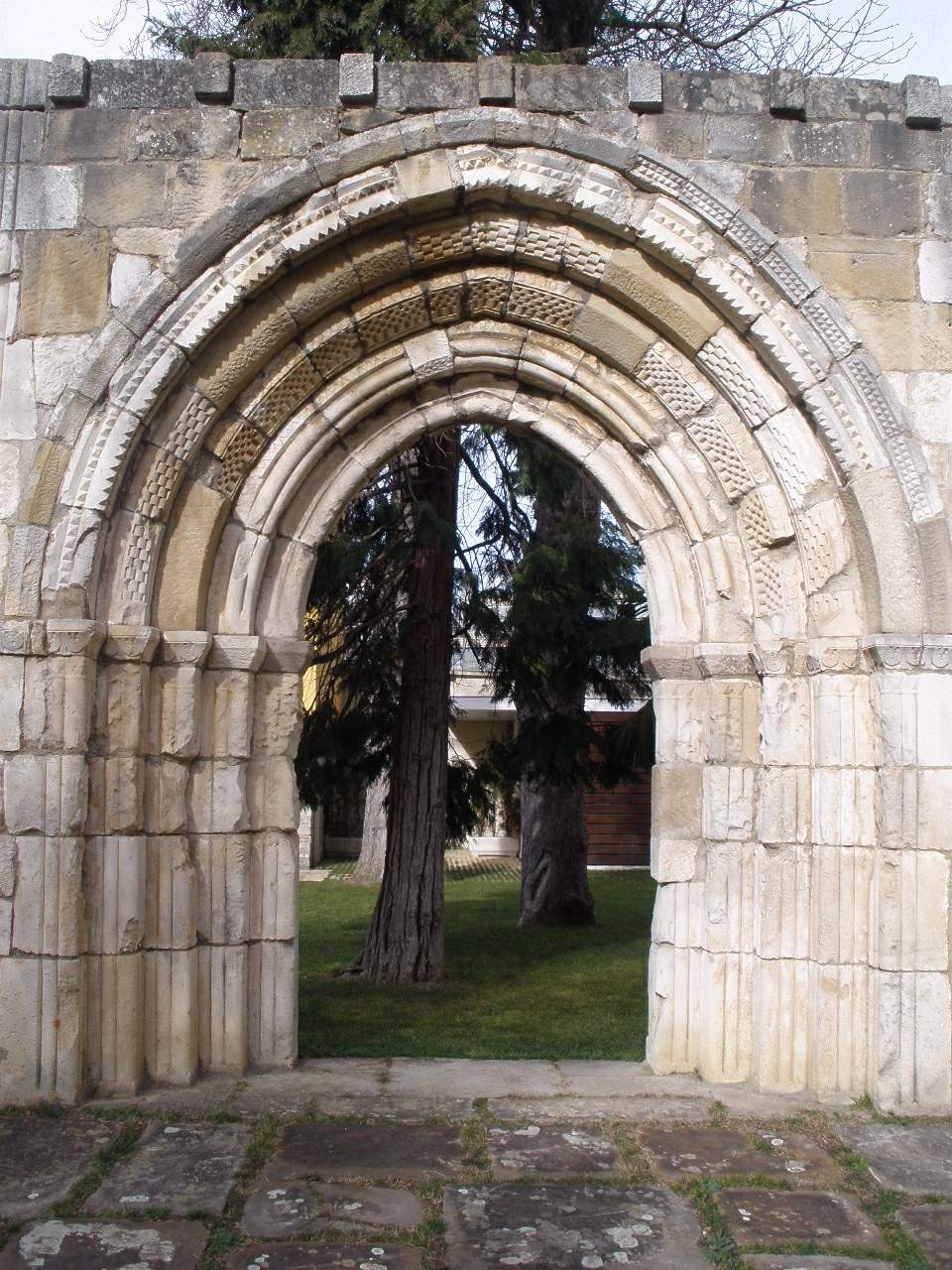 Vitoria - Museo de Bellas Artes de Álava. Portada procedente de la Ermita de San Martín de Guesal (Maeztu)